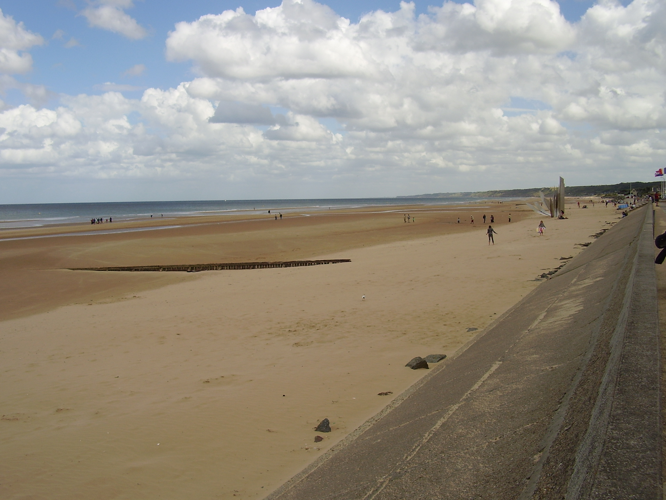 Omaha Beach